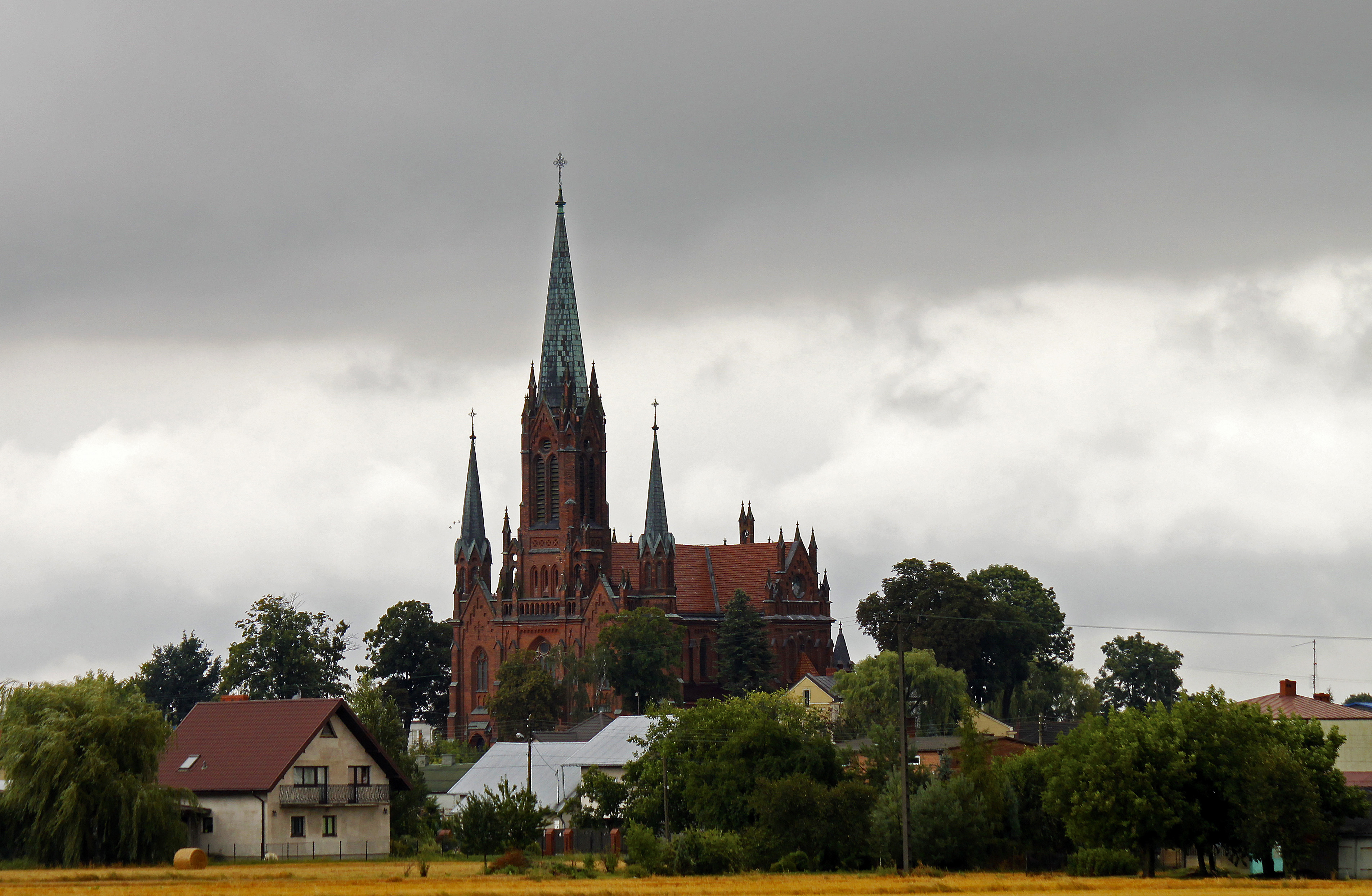 Parafia św. Jakuba Apostoła w Zdunach